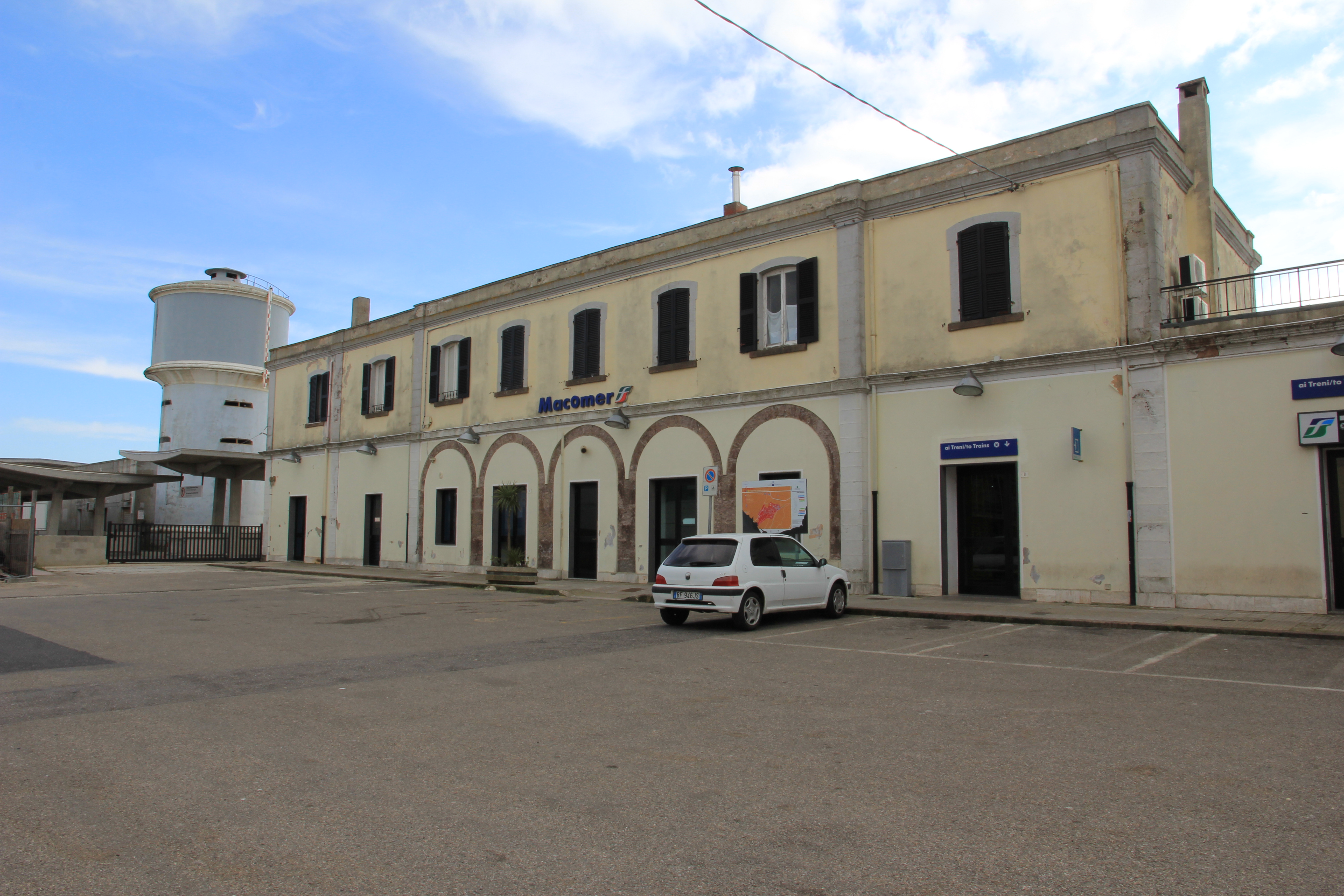 Stazione ferroviaria FS di Macomer